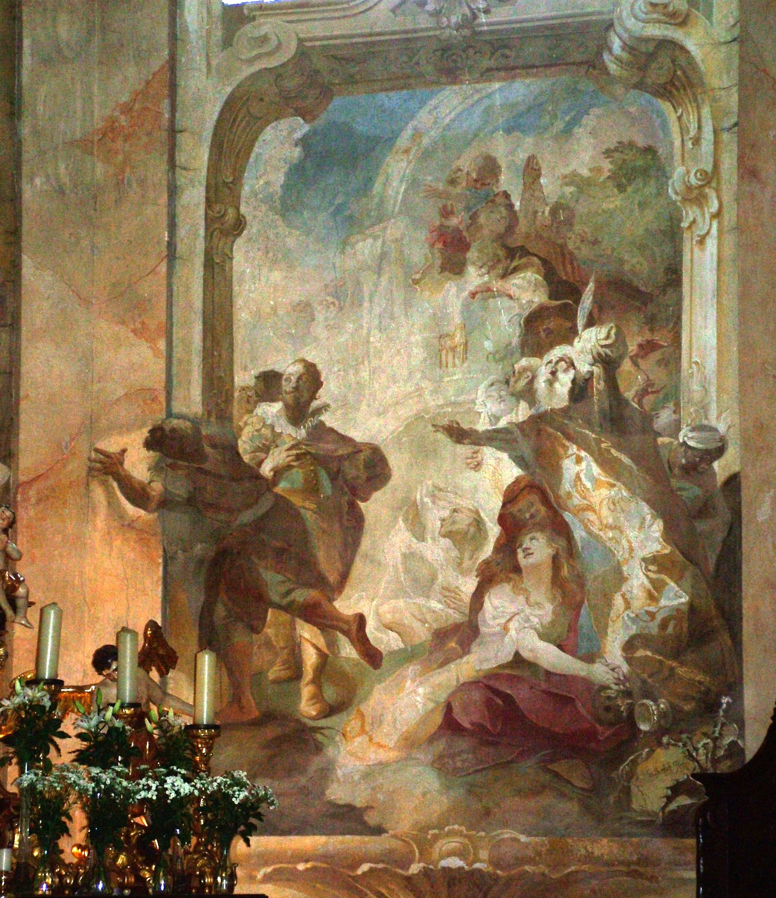 A sümegi plébániatemplom Maulbertsch-freskója